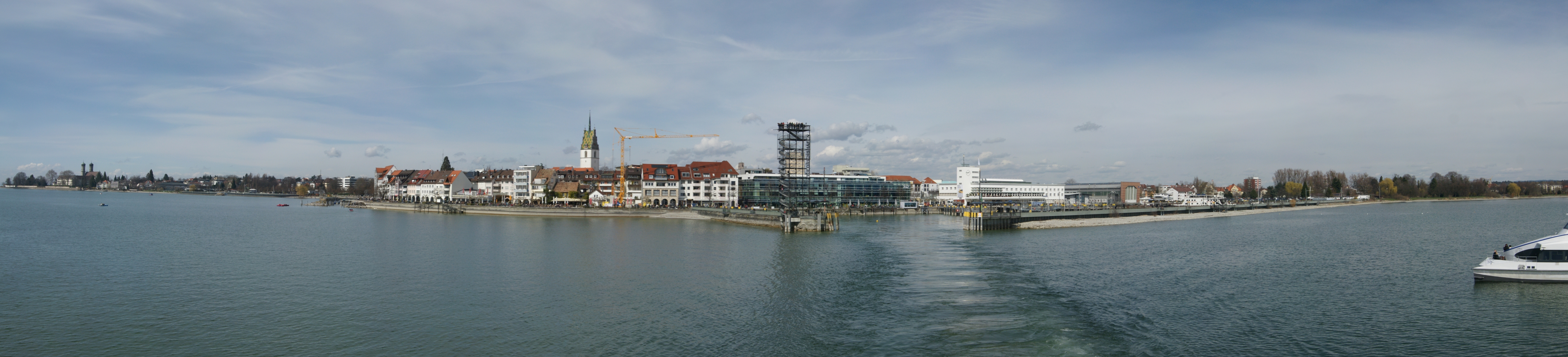 Blick zurück vom Fährschiff MF Romanshorn auf Friedrichshafen. Panorama mit 6 Einzelbilder.